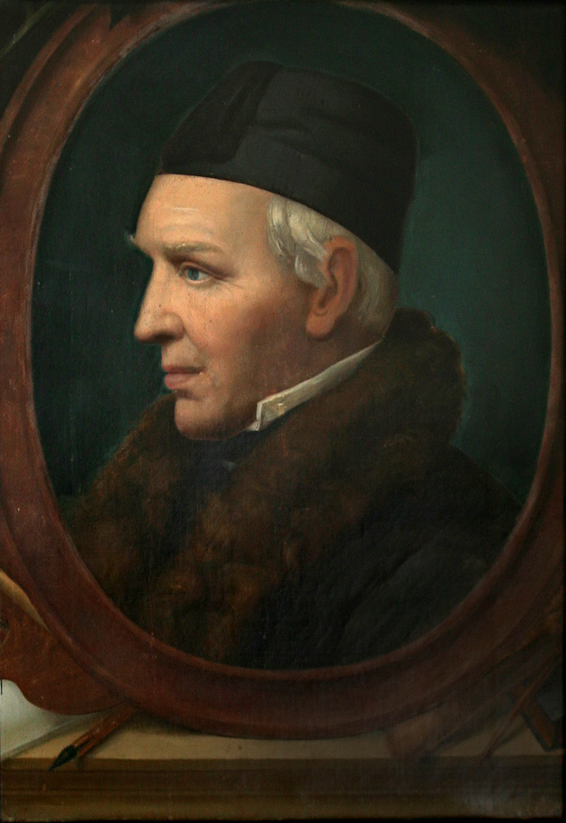 Porträt des Nazarener-Malers Gebhard Flatz